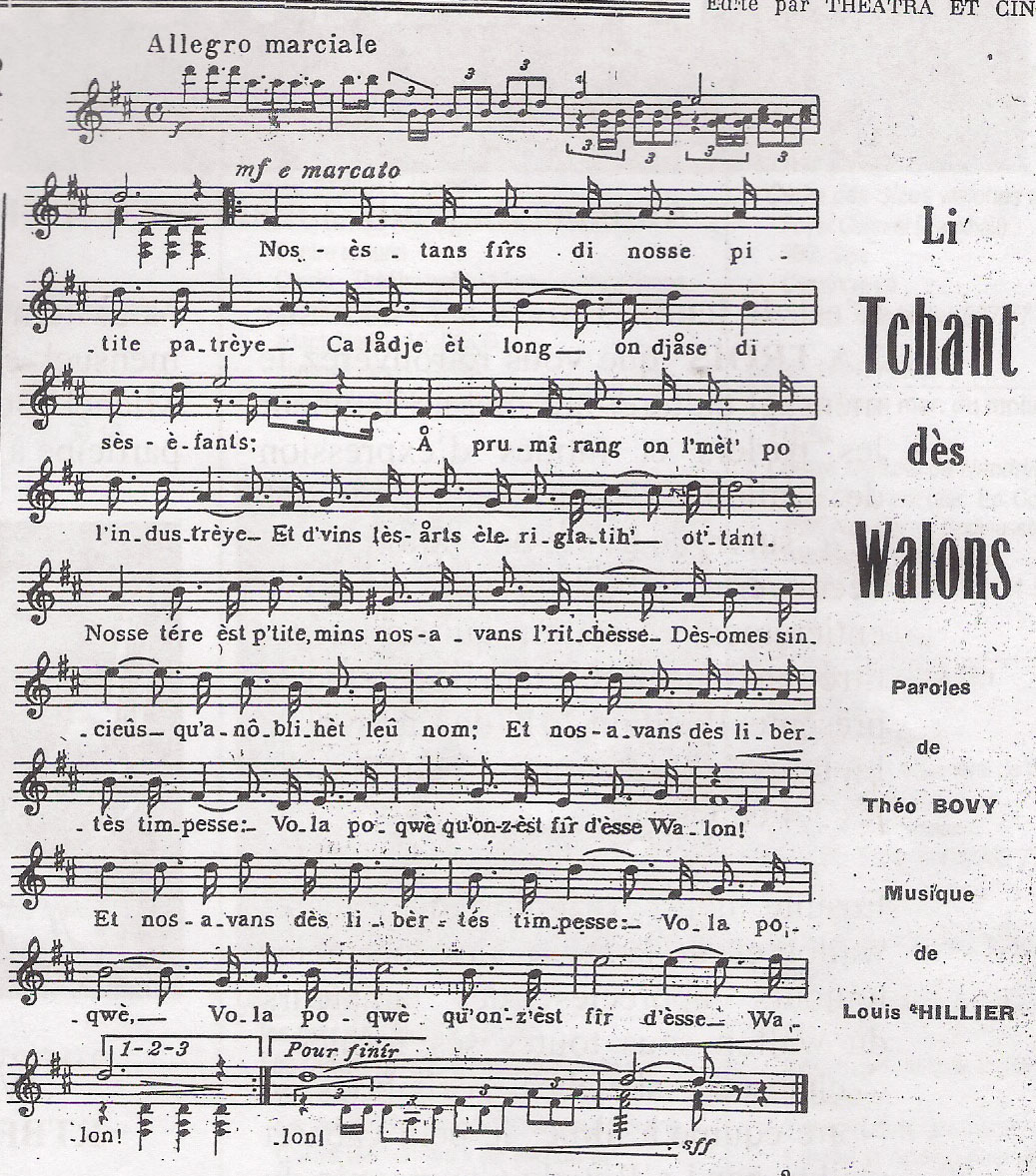 Walon: Pårticion do Tchant des Walons; li tecse est riscrît e Sistinme Feller